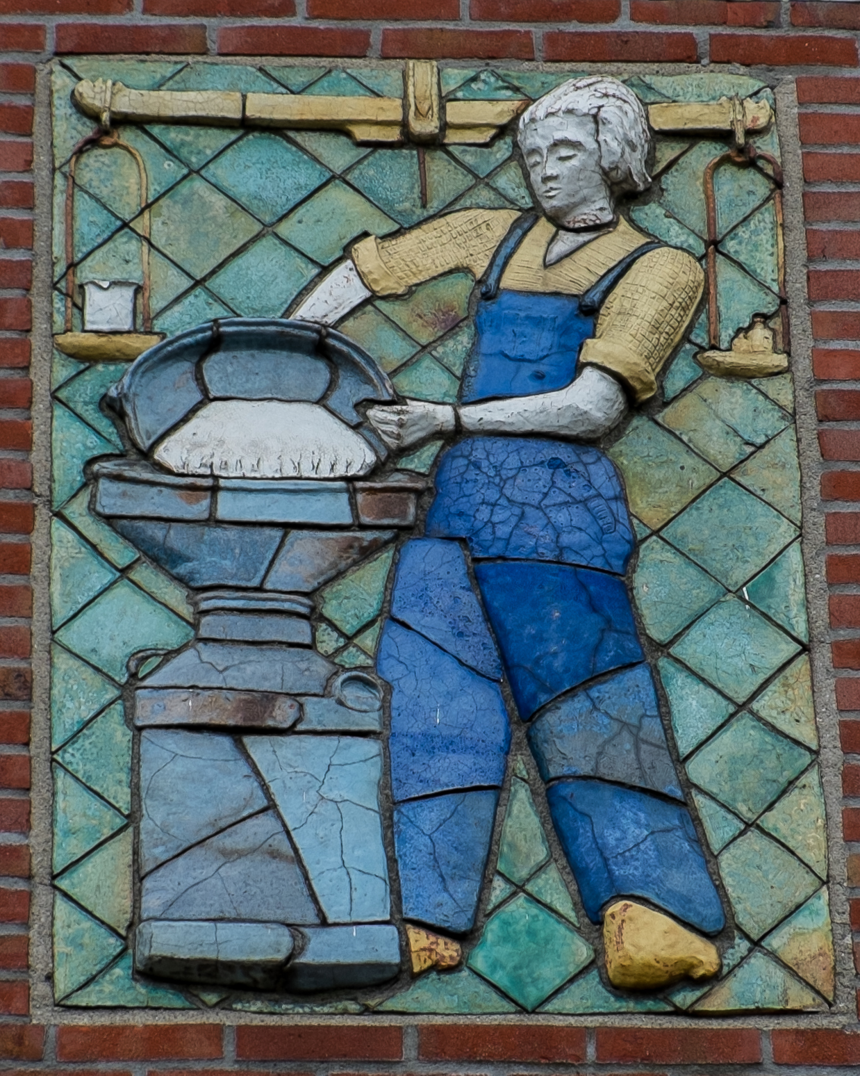 Friesestraatweg 215